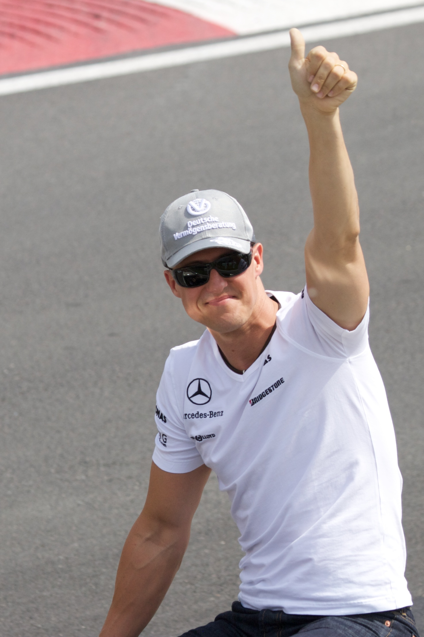 Michael Schumacher in Canadian GP 2010